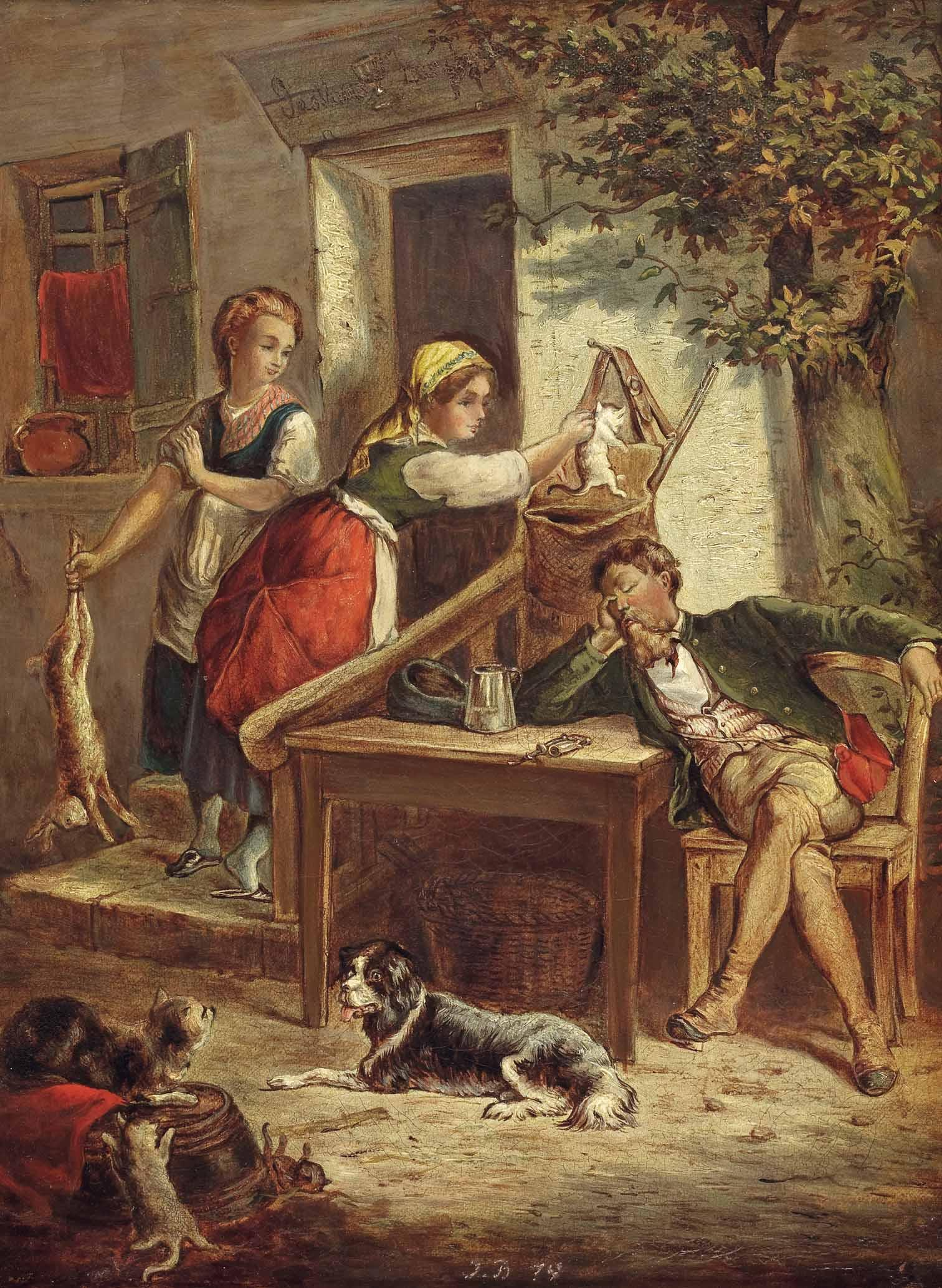 Der lustige Tausch für den eingeschlafenen Jäger.label QS:Lde,"Der lustige Tausch für den eingeschlafenen Jäger."